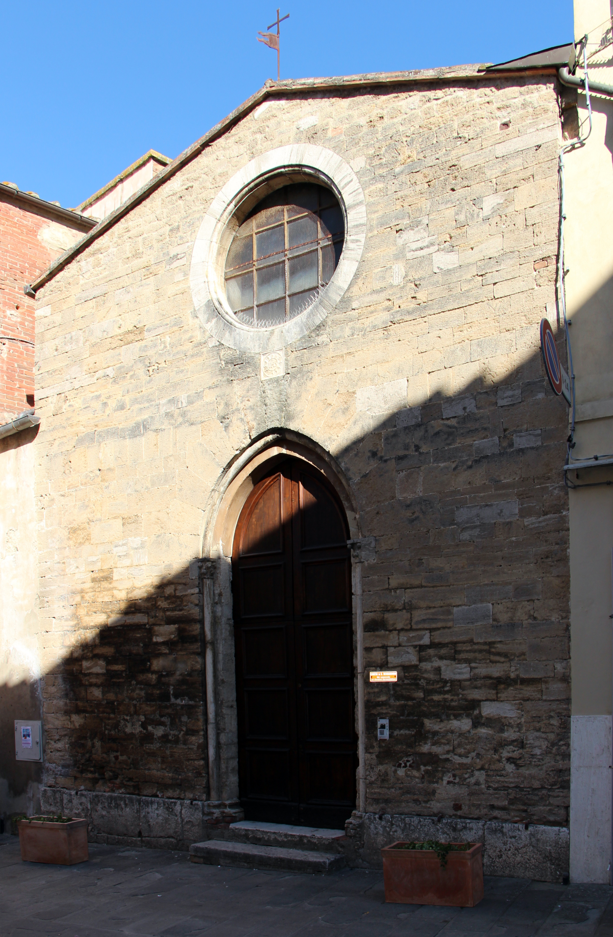 Asciano (si)